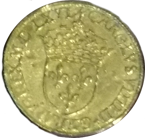 Écu Charles IX